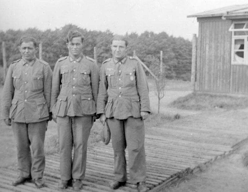 Armenier. (Lager Schwarzsee)